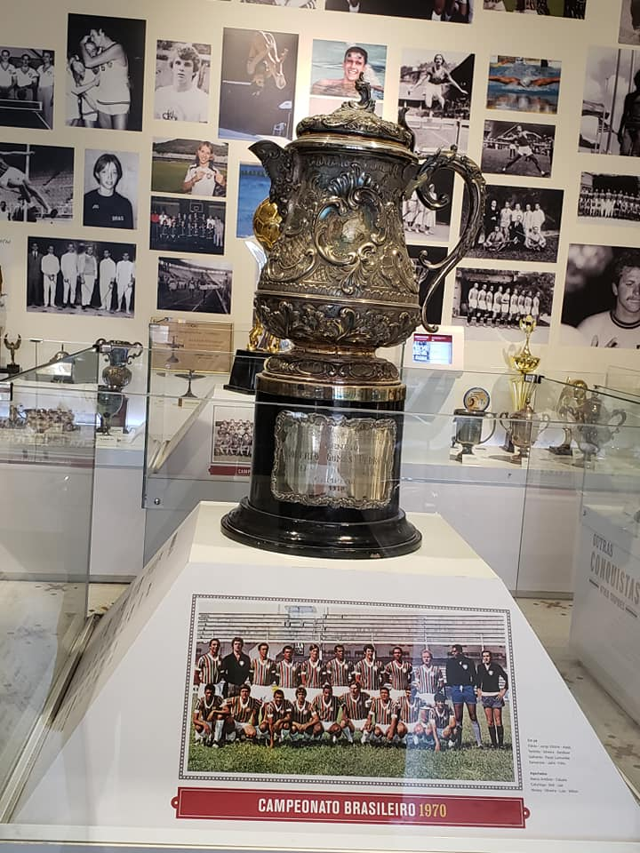 Taça do Campeonato Brasileiro de Futebol de 1970 Primeira Divisão